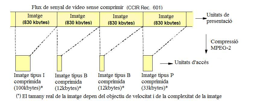 Tramas_mpeg